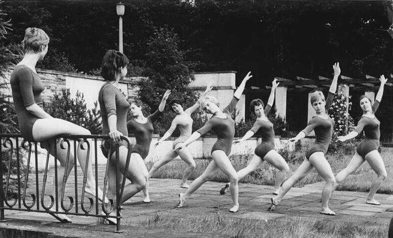 Zentralbild / Eckleben / Eckl.-Kt / 16.7.1962 "Im August, im August blühn die Rosen". Festivalstimmung herrscht seit dem Wochenende in der Jugendhochschule "Wilhelm-Pieck" am Bogensee bei Berlin. Die Teilnehmer zu den VIII. Weltfestspielen in Helsinki arbeiten mit viel Begeisterung und Fleiß an einem Kulturprogramm, das sie in die Festivalstadt mitnehmen wollen. (Am 21.7.1962 haben die Berliner Gelegenheit, einige Gruppen in einem großen Programm in der Wuhlheide bewundern zu können). UBz: Die Gymnastikgruppe der DHfK bei Probenarbeiten.